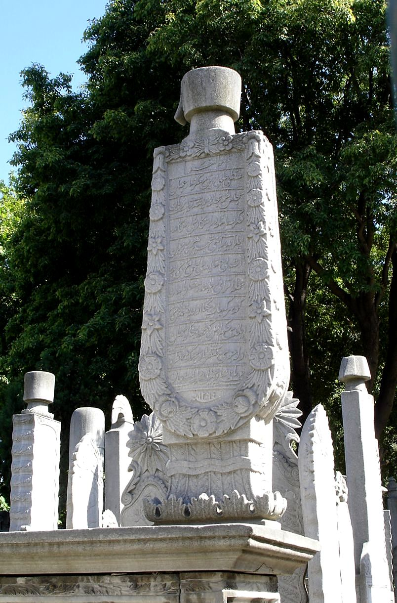 Osmanischer Grabstein Eyüp-Friedhof Istanbul (Ausschnitt aus der unten angegebenen Quelle.